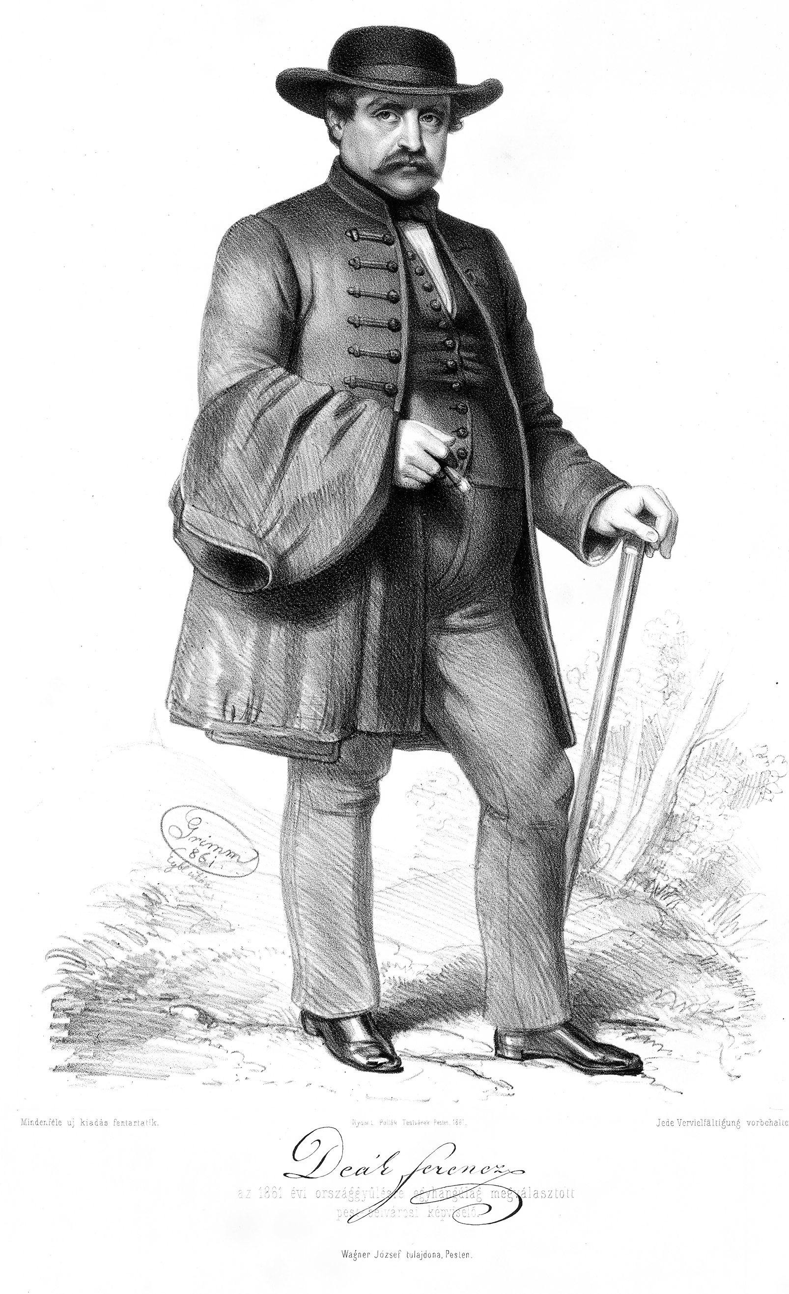 Deák Ferenc 1861-ben. Grimm Vince kőnyomata